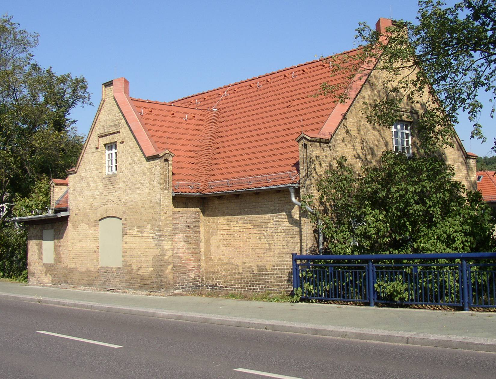 Chausseehaus in Neu Fahrland (Ortsteil von Potsdam) in Brandenburg, Deutschland